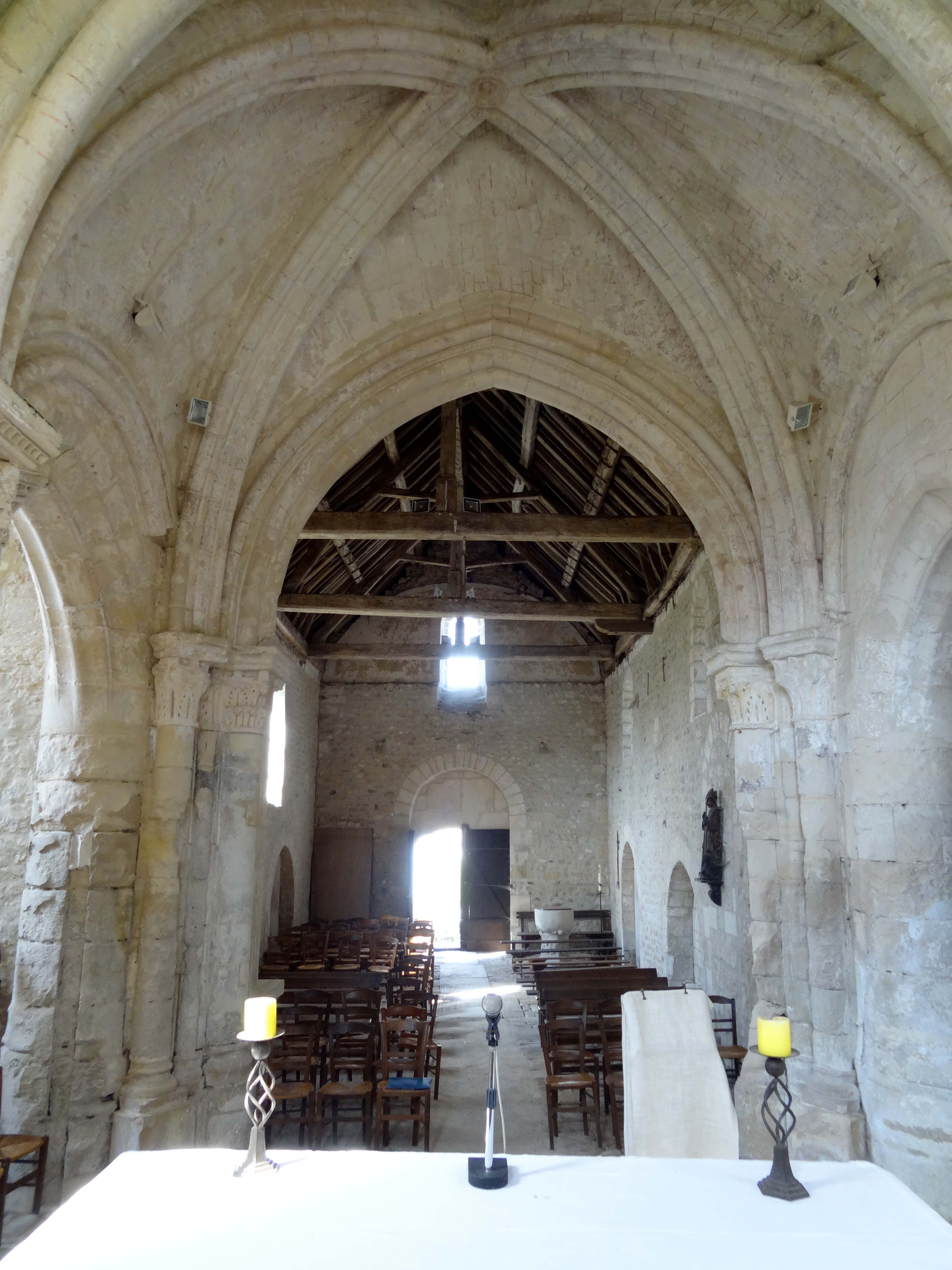 Intérieur de l'église - voir titre.